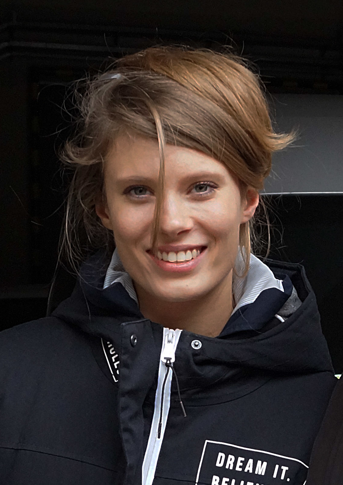 Julia Pietrucha